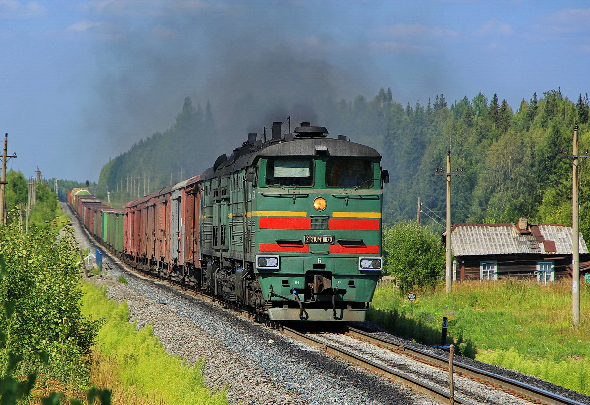 Ранее — ТЧ-29 Курск-Сортировочный Московской ж. д. Летом 2004 г. в аренде у компаниии "Промтехдепо", работал на участке Кандалакша — Ковдор. КР 03.2000 г. СР 07.2008 г. 10.2011 г. срок службы продлен до 2028 г. КР Уссурийский ЛРЗ 03.2016 г.